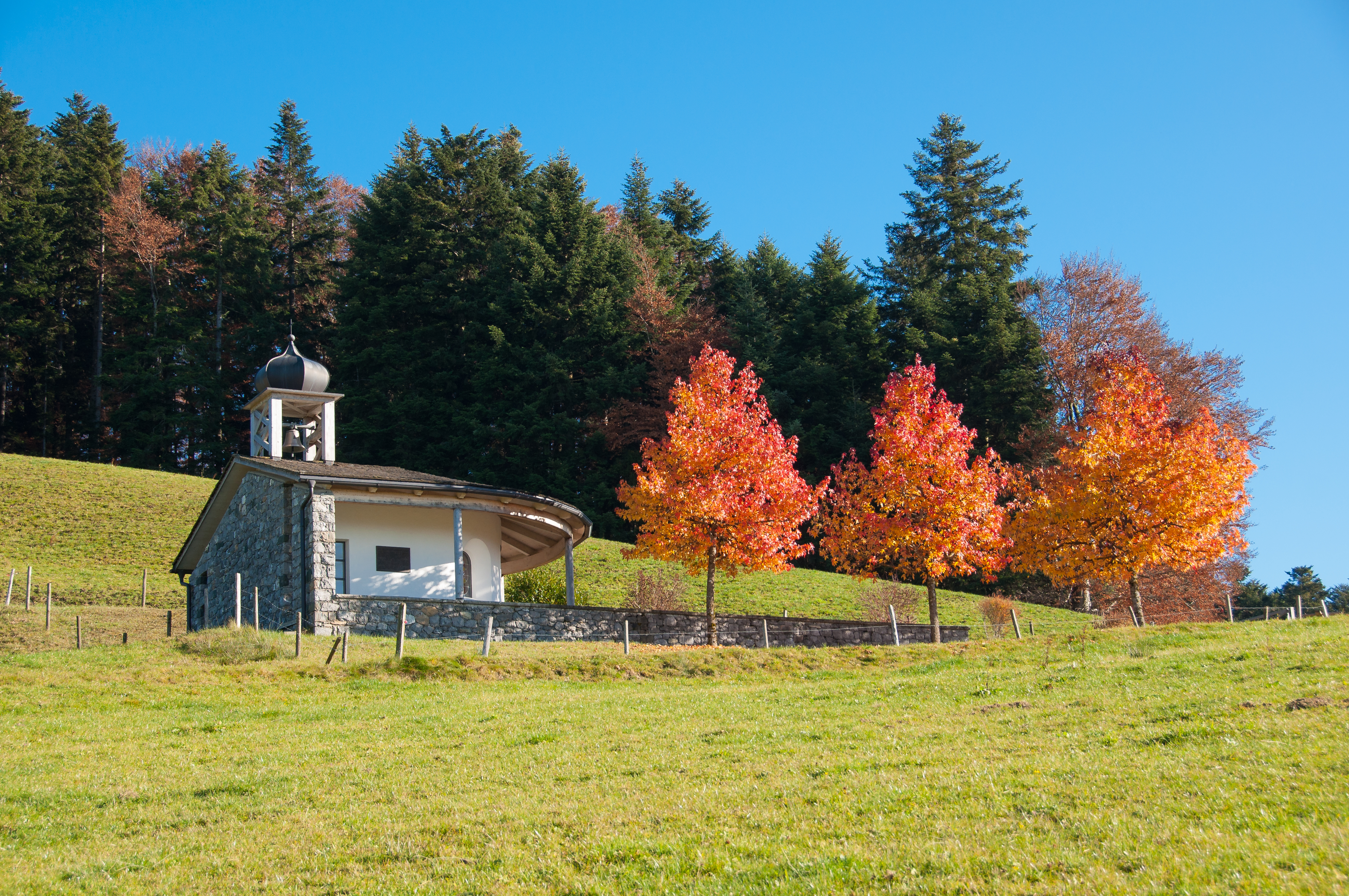 Hubertuskapelle in Langenegg.